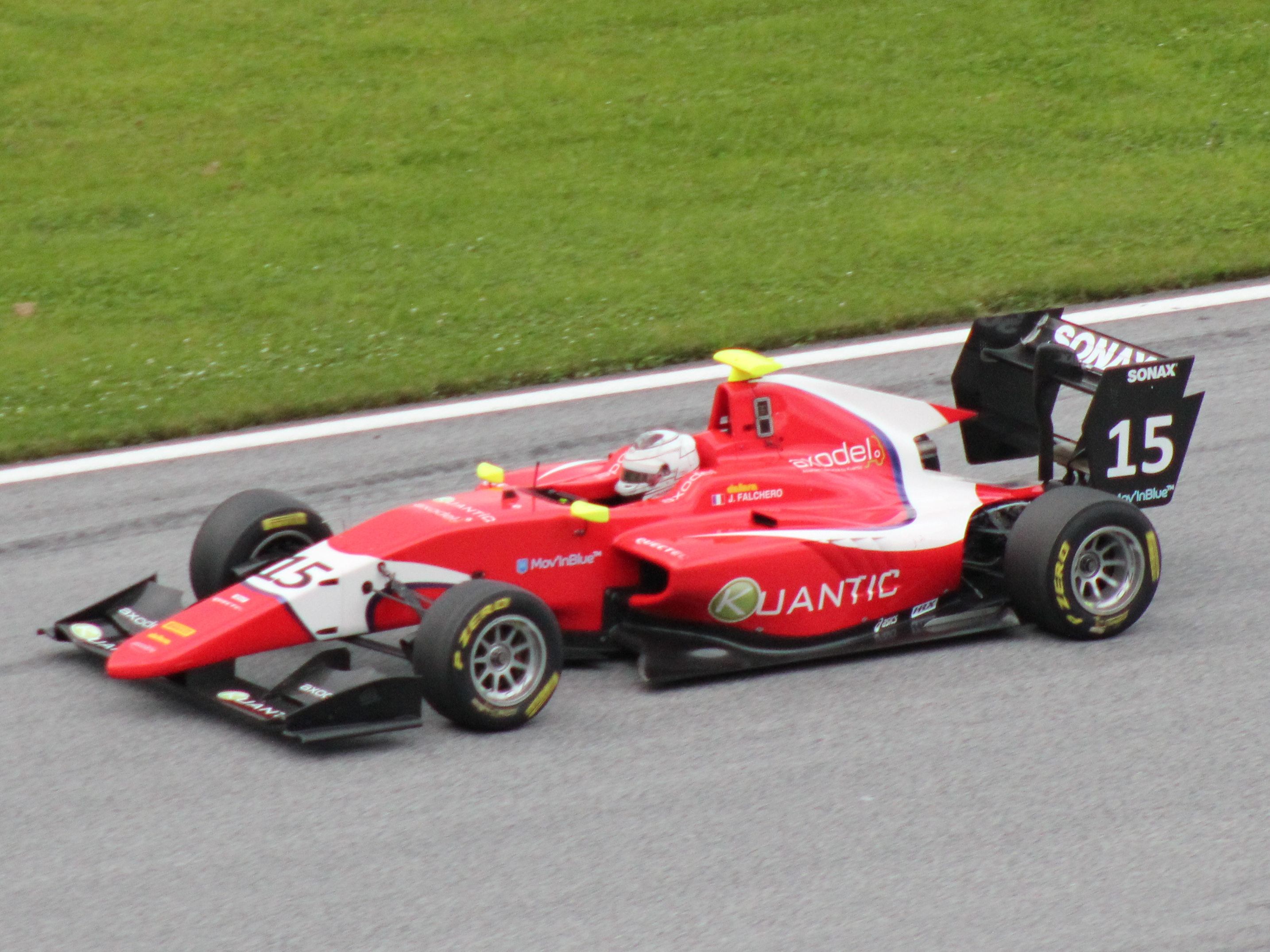 15 Julien Falchero beim Rennwochenende in Österreich 2018